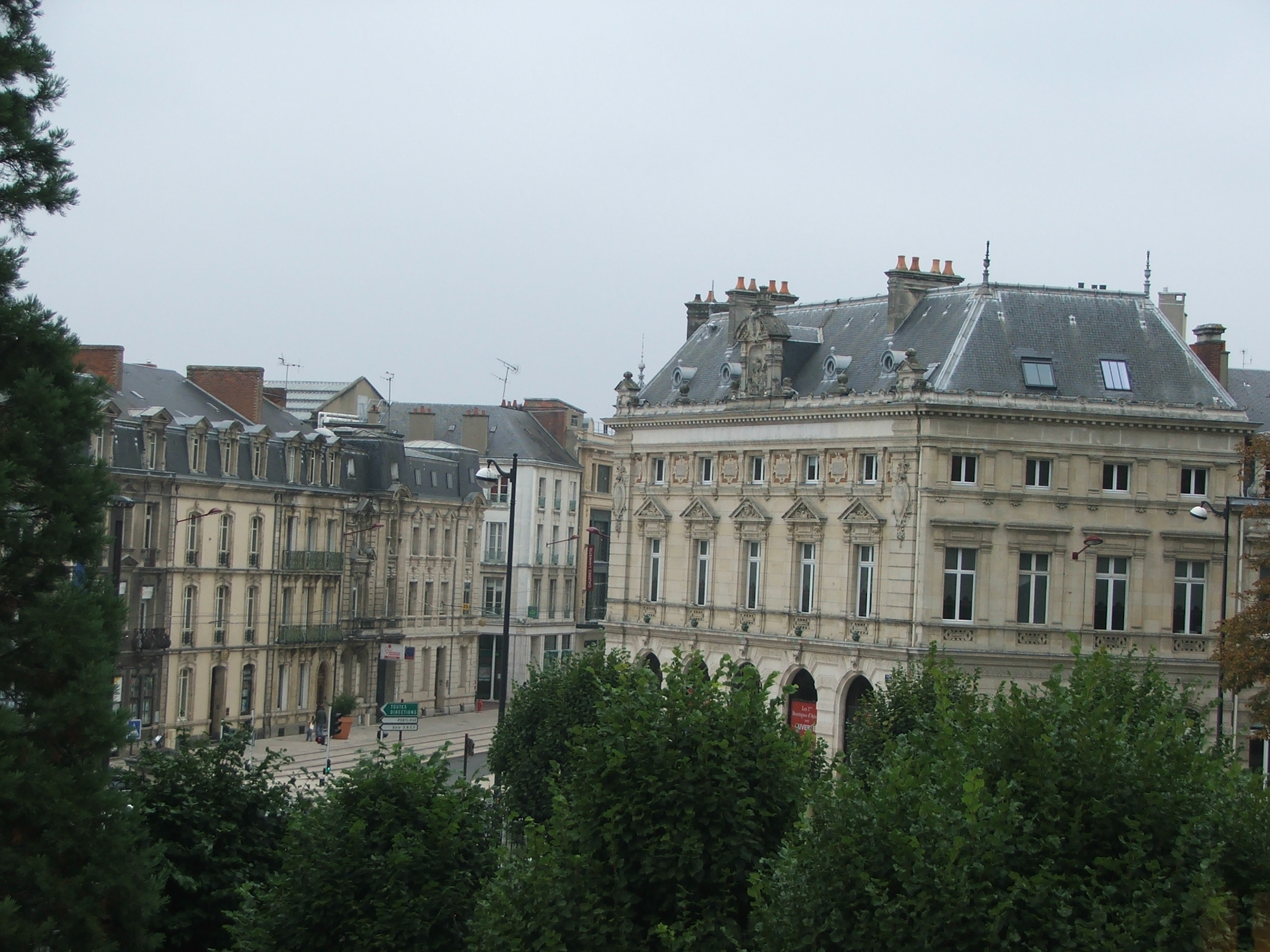 Vue sur le bâtiment de la Caisse D'épargne depuis la préfecture du Mans. En contrebas, le boulevard René Levasseur.